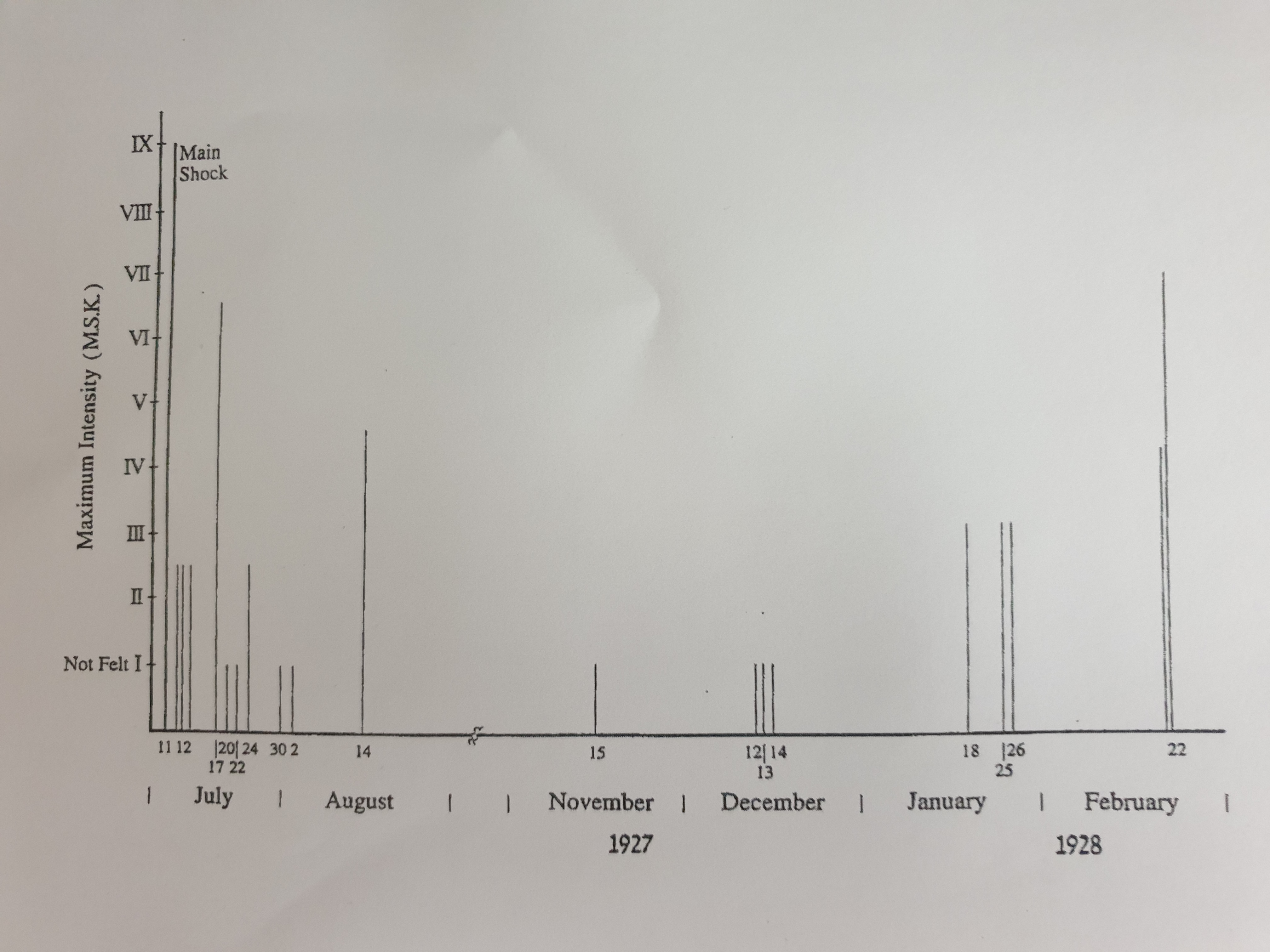 Aftershocks Diagram for 1927 E.Q. in the Holy Land